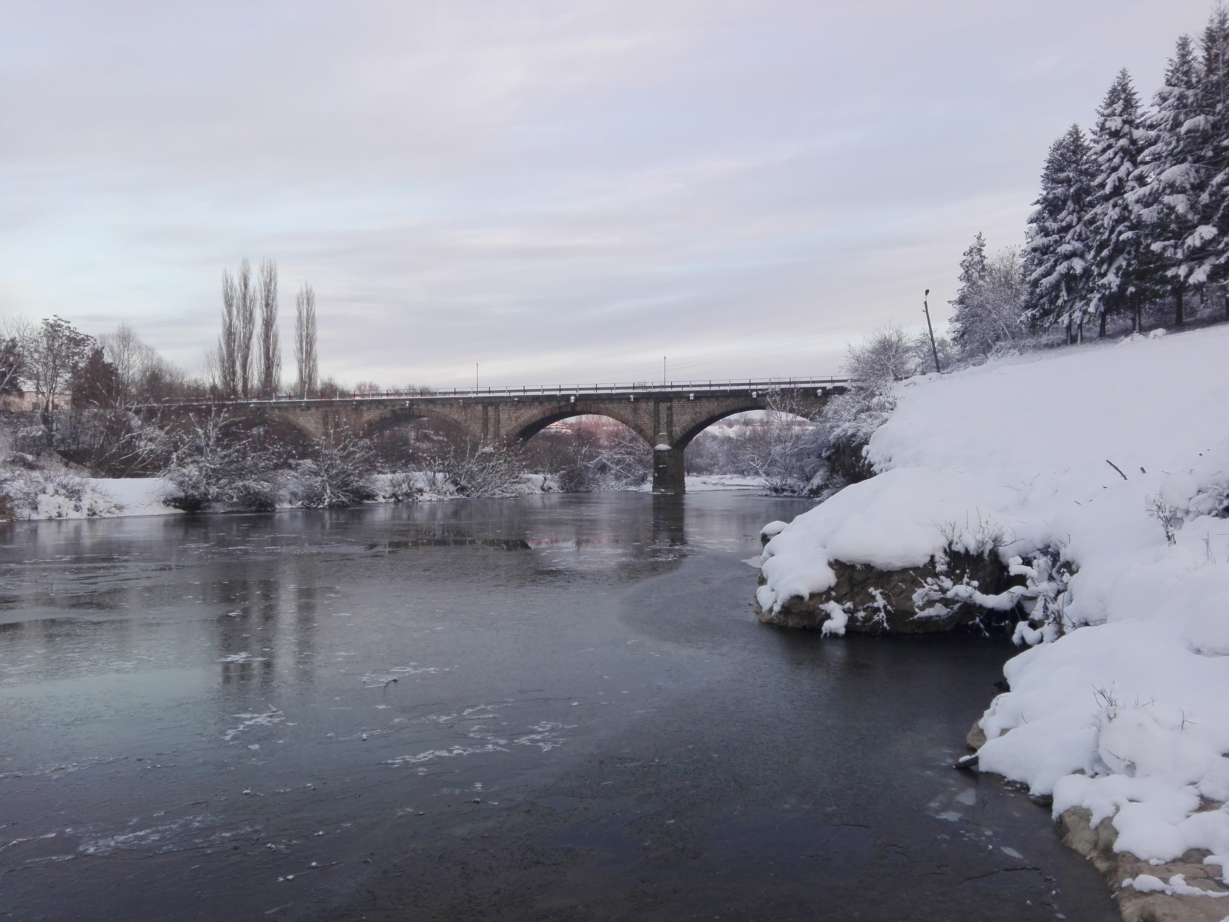 Моста над река Вит при село Ъглен през зимата